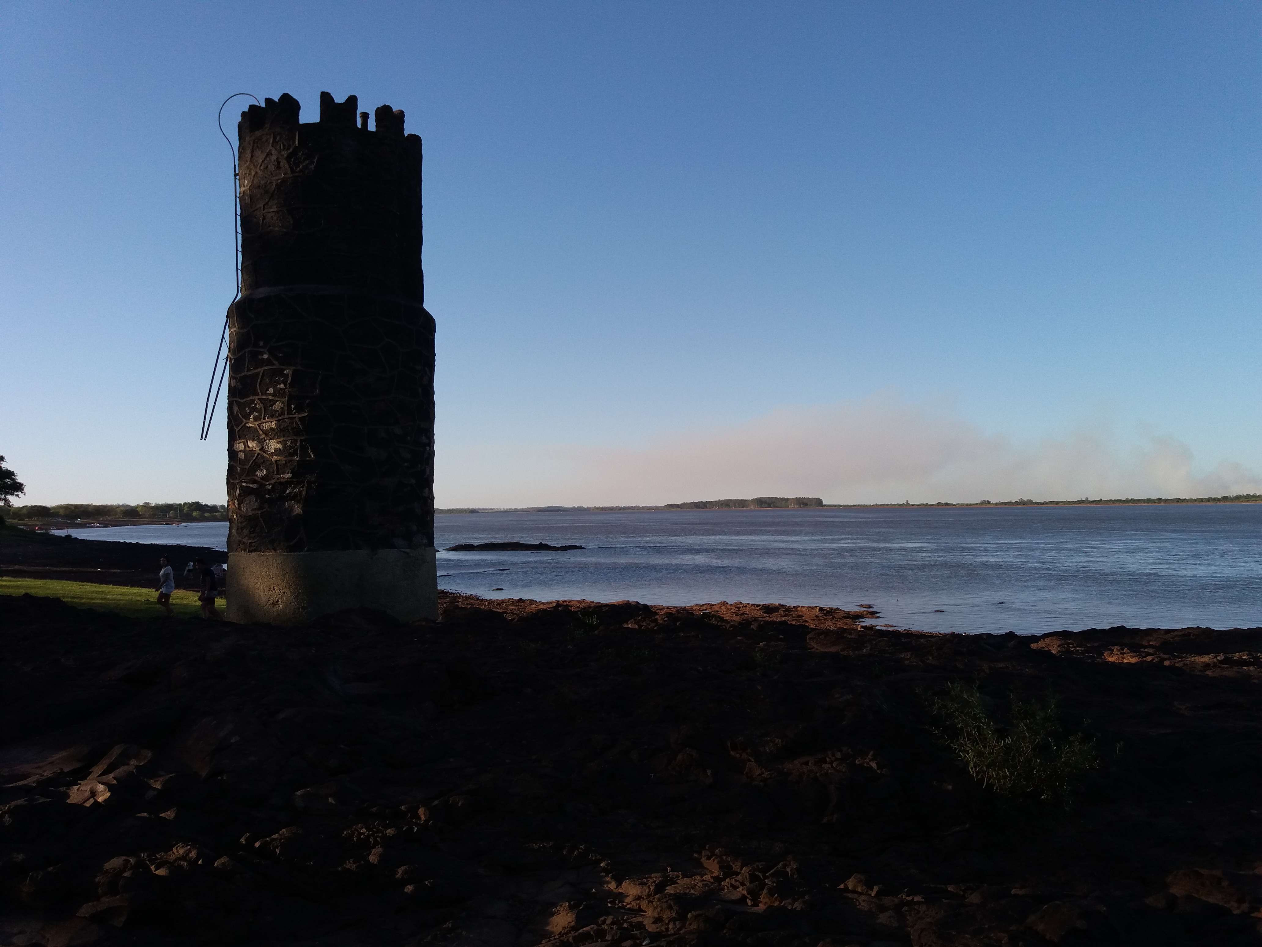 Vista hacia el río uruguay